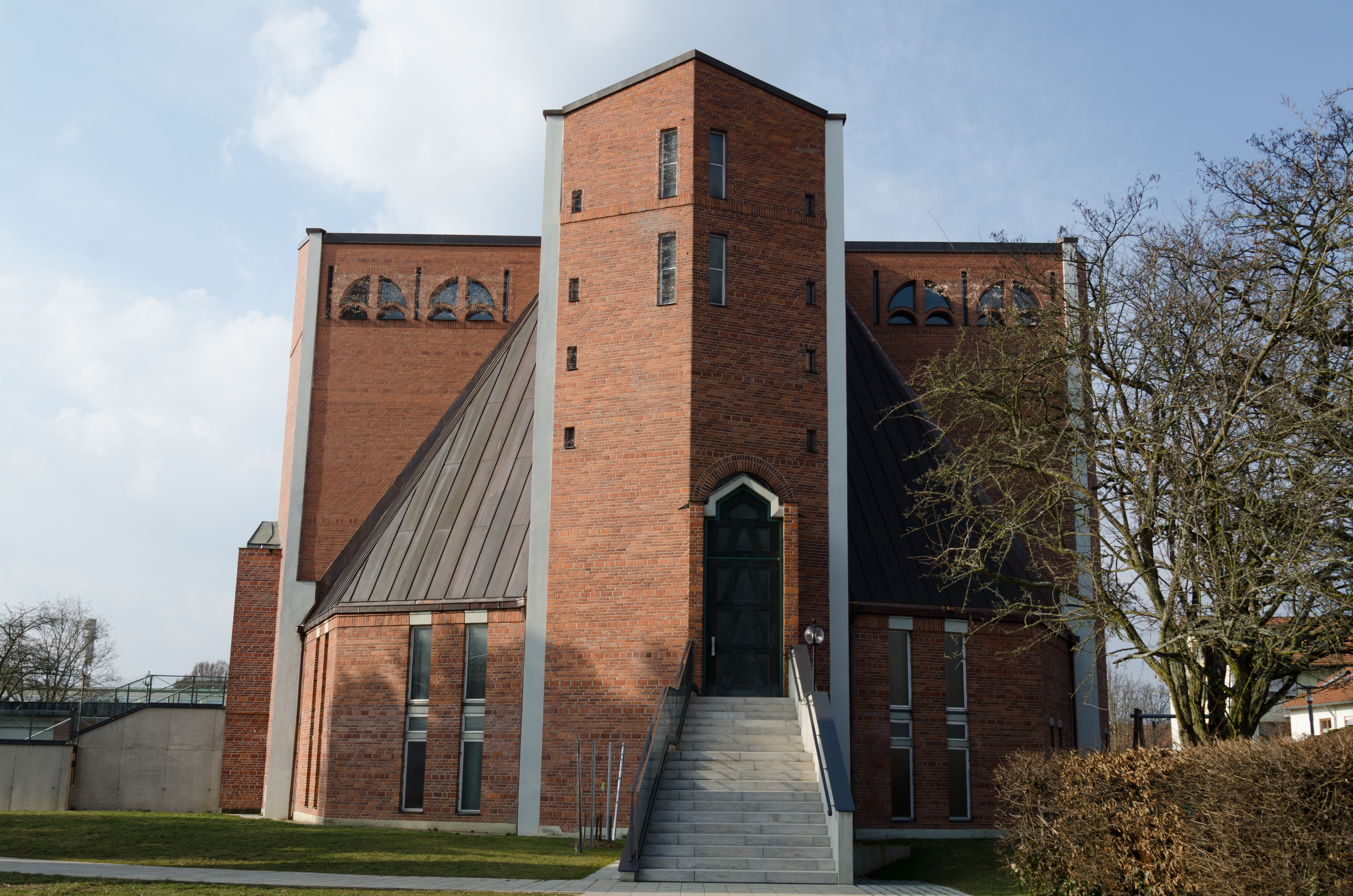 Schweinfurt, Brombergstraße 73